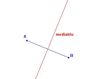 Mediatriu d'un segment